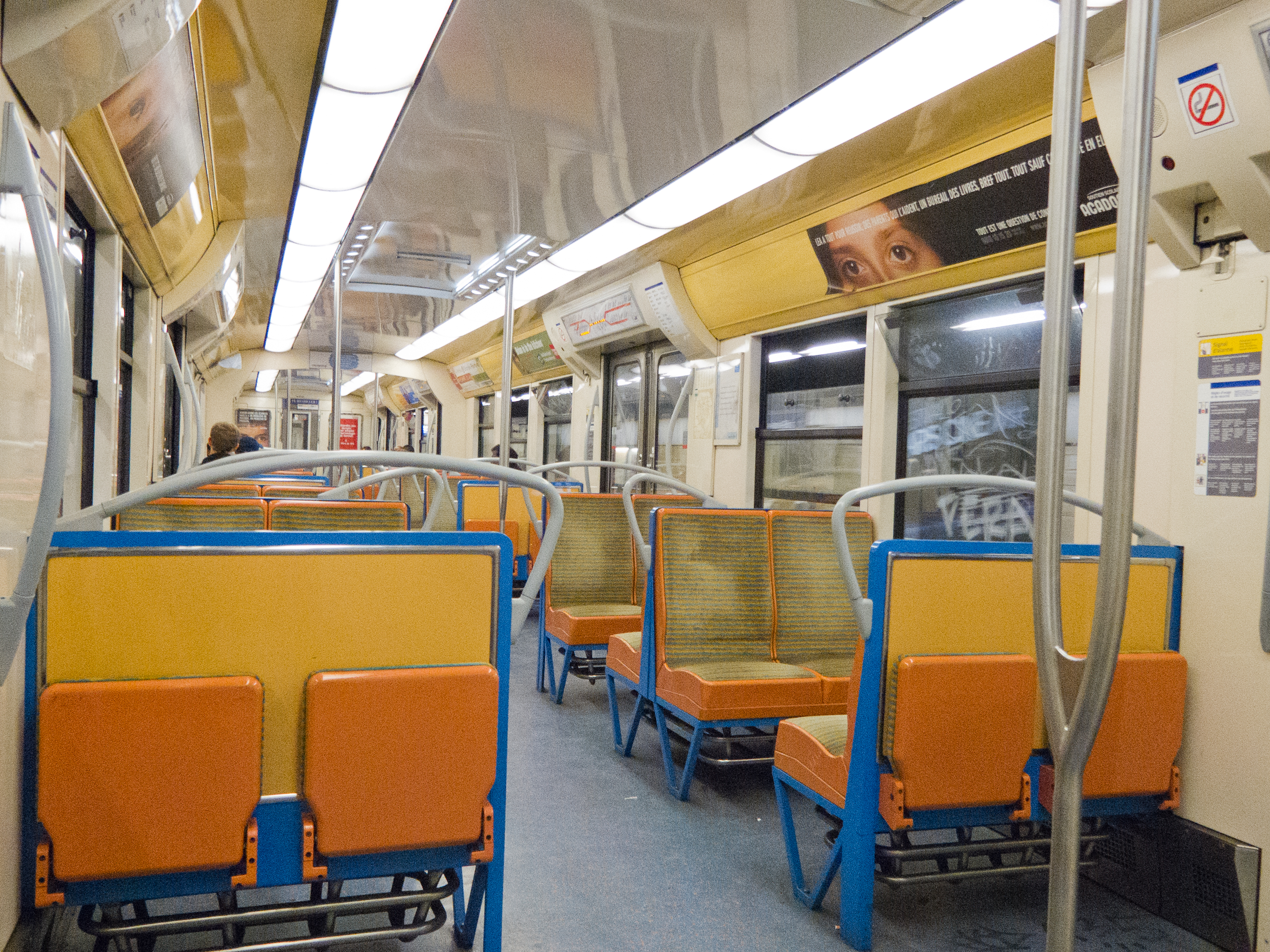 Intérieur d'une rame MS 61 rénovée. Juin 2012. Ligne A du RER. Ile de France.